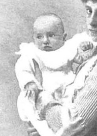 La princesa de Asturias con el infante Fernando María por Franzen y recogido en la revista española Nuevo Mundo.